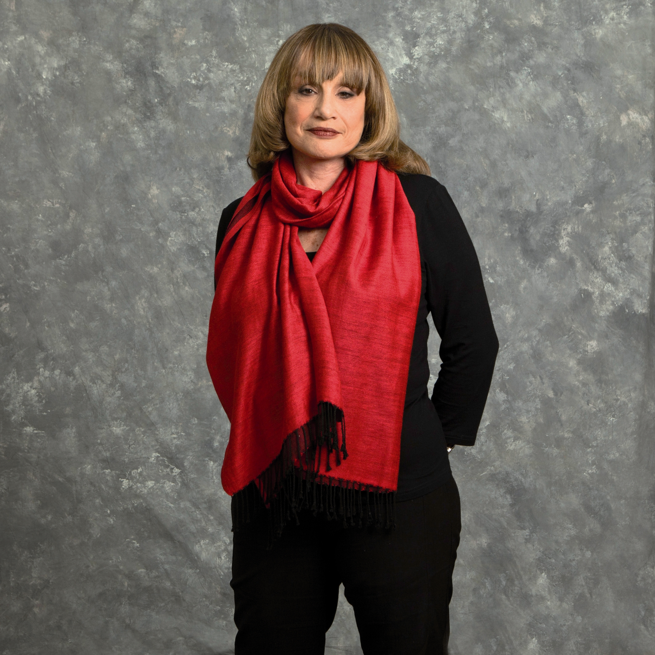 יהודית וינשטוק